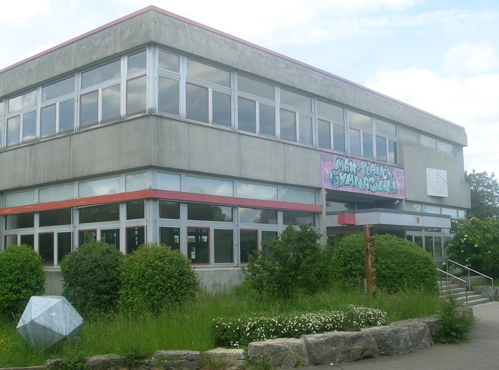 Haupteingang des Max-Planck-Gymnasiums in Heidenheim an der Brenz auf dem Galgenberg